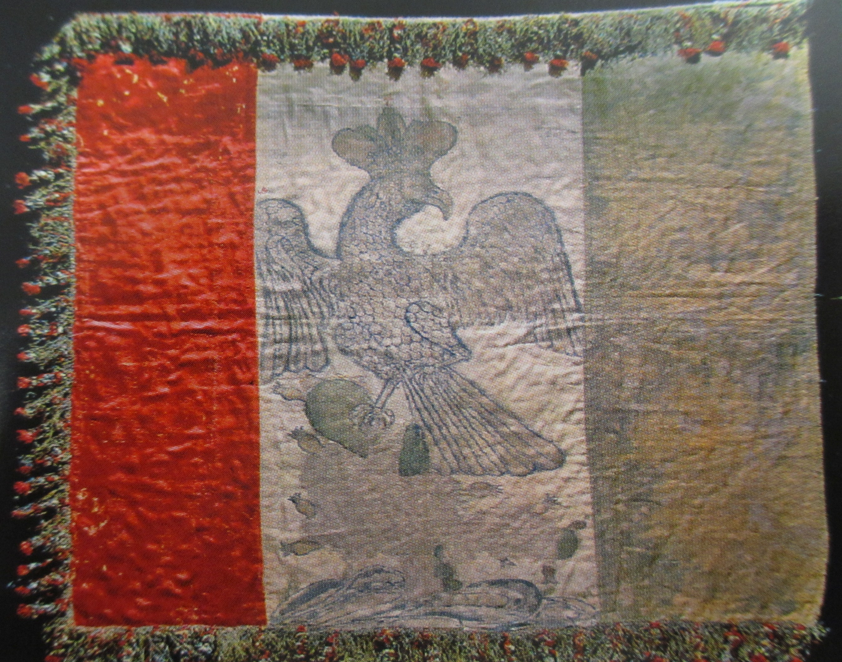 Bandera con la que se juró el Imperio Mexicano de Iturbide en San Juan Bautista (hoy Villahermosa,) en el estado de Tabasco, México, en 1822. Está confeccionada en tela de seda, tiene el águila coronada parada sobre un nopal (casi perdido). Cuenta con un fleco de hilo de seda y oro. Museo Nacional de Historia, Castillo de Chapultepec, México, D.F.